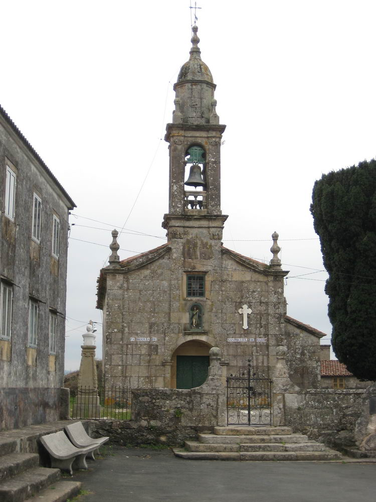 Rarís, Teo, Galicia.